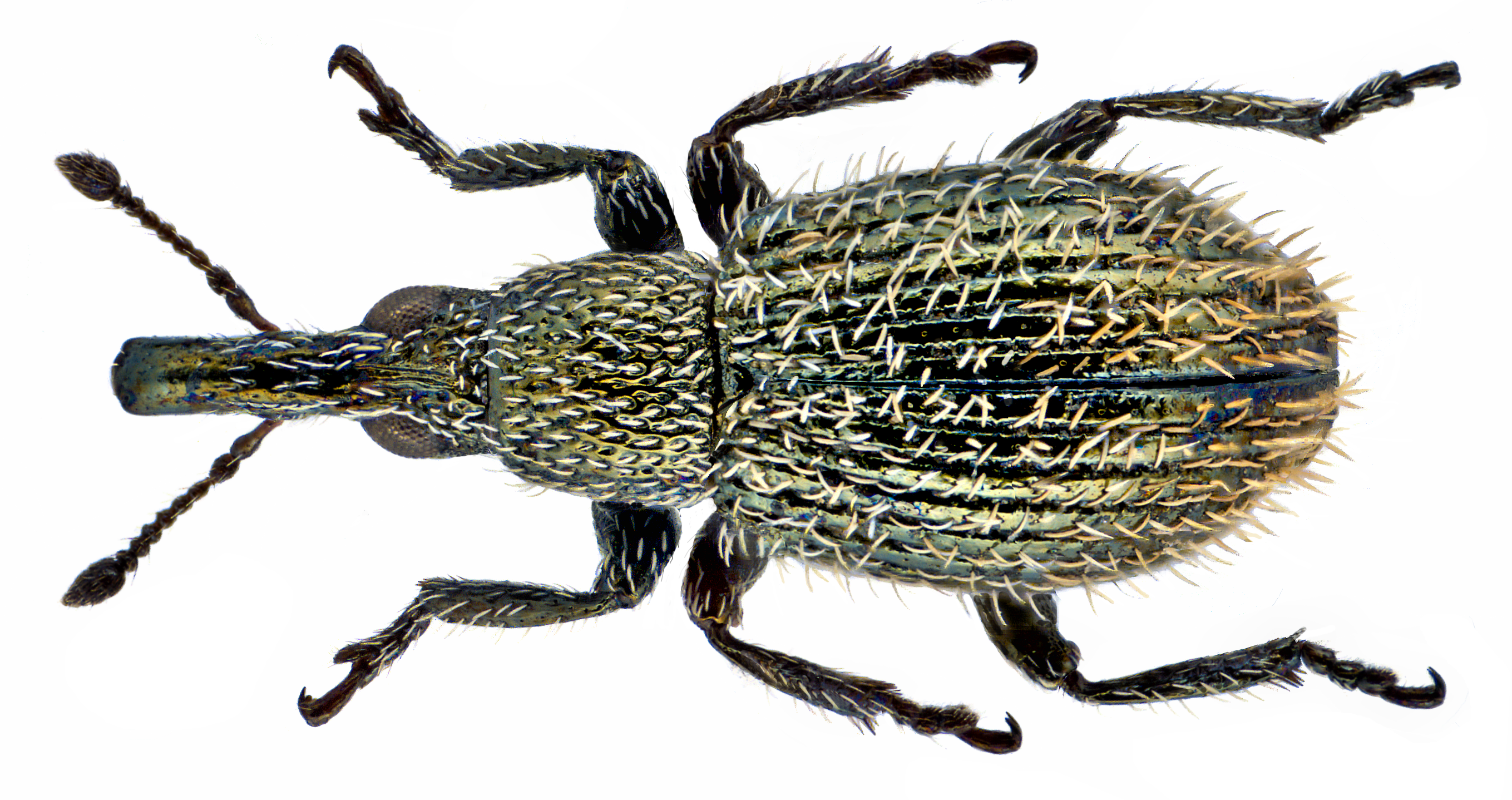 Family: Apionidae Size: 1,8 mm Location: Tenerife, Arafo, 6 km North, 870 m leg. J.Schoenfeld, 9.IV.2004; det. Behne, 2005 Photo: U.Schmidt, 2014